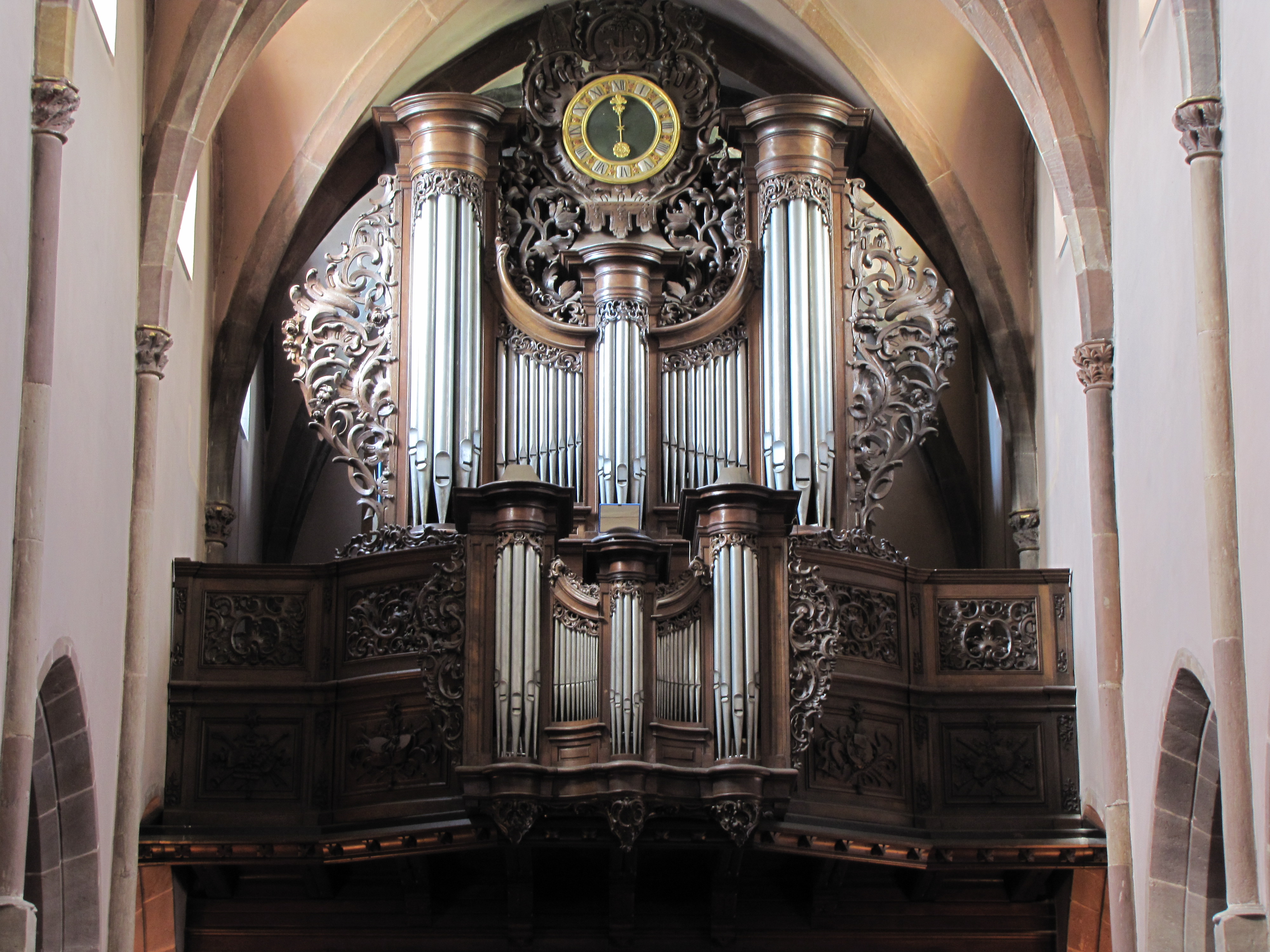 Alsace, Bas-Rhin, Église Saint-Nicolas de Haguenau, (Ancienne église du Couvent des Prémontrés) (PA00084725, IA00061903). Orgue baroque Rohrer (1747): This object is classé Monument Historique in the base Palissy, database of the French furniture patrimony of the French ministry of culture, under the references PM67001022, IM67002186 and buffet+garde-corps PM67000597 buffet+garde-corps.